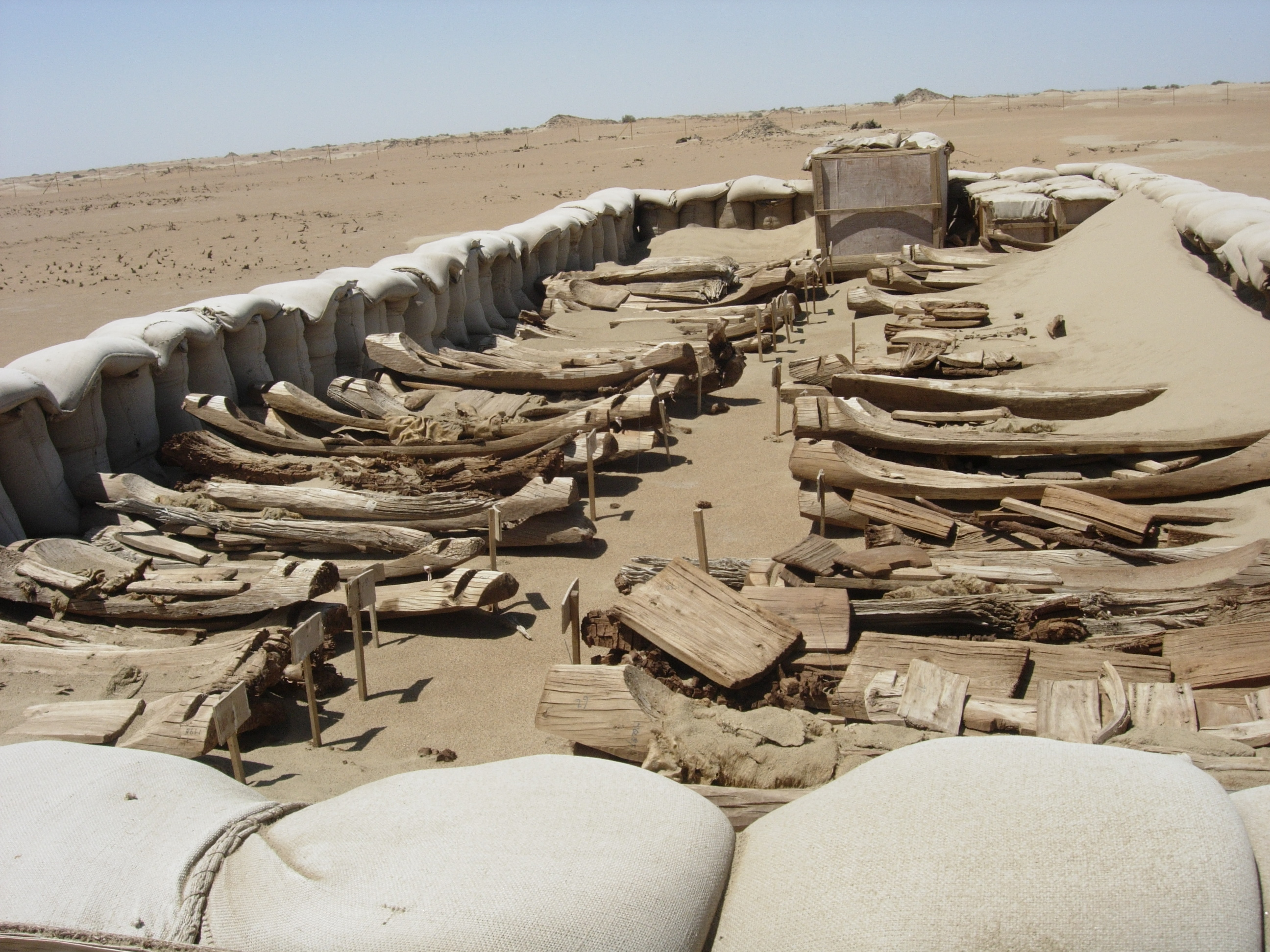 小河墓地。Creek burial, Urumqi, Xinjiang